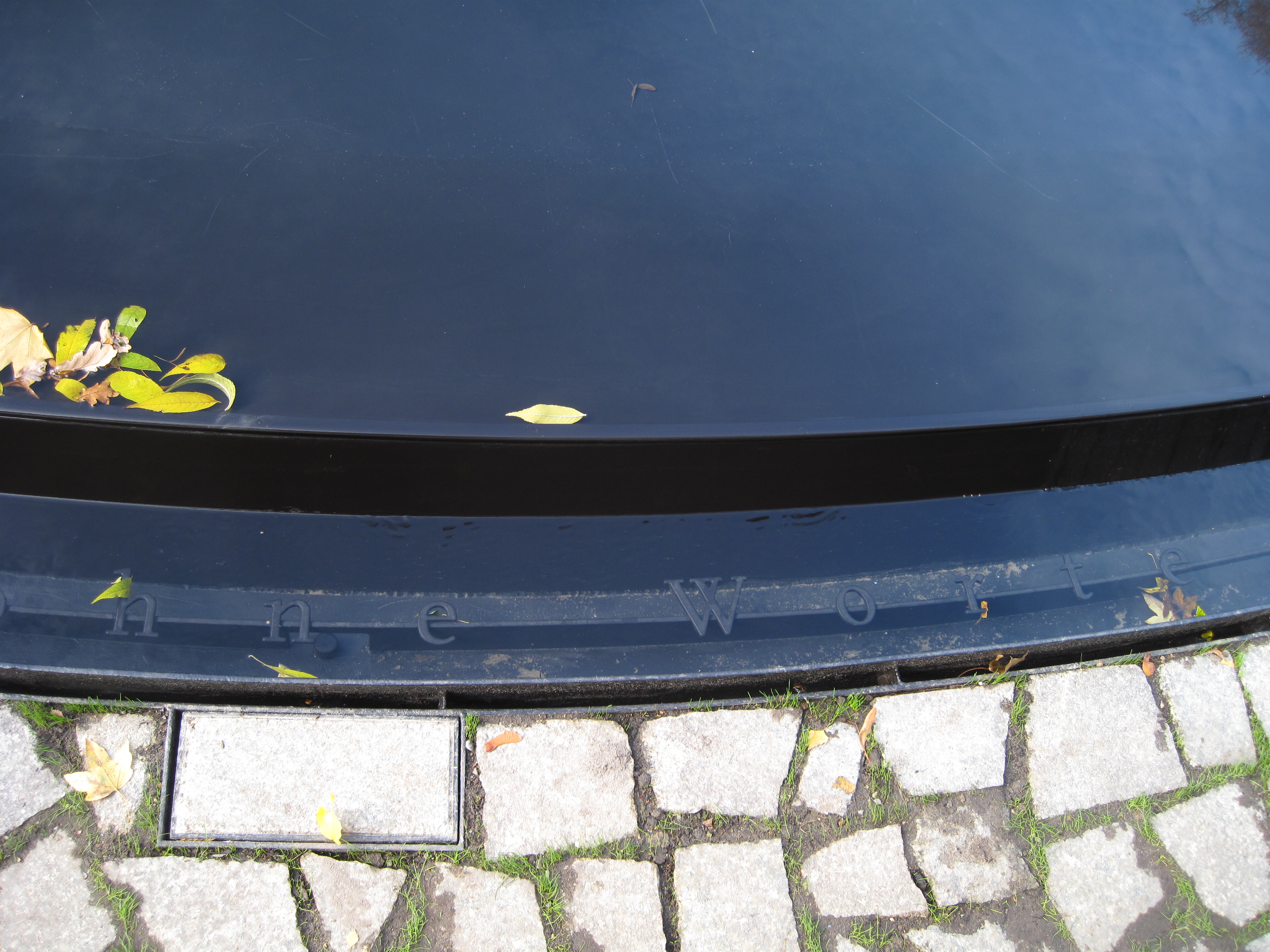 Gedenkstätte Denkmal für die im Nationalsozialismus ermordeten Sinti und Roma Europas in Berlin-Tiergarten südlich des Reichstagsgebäudes.